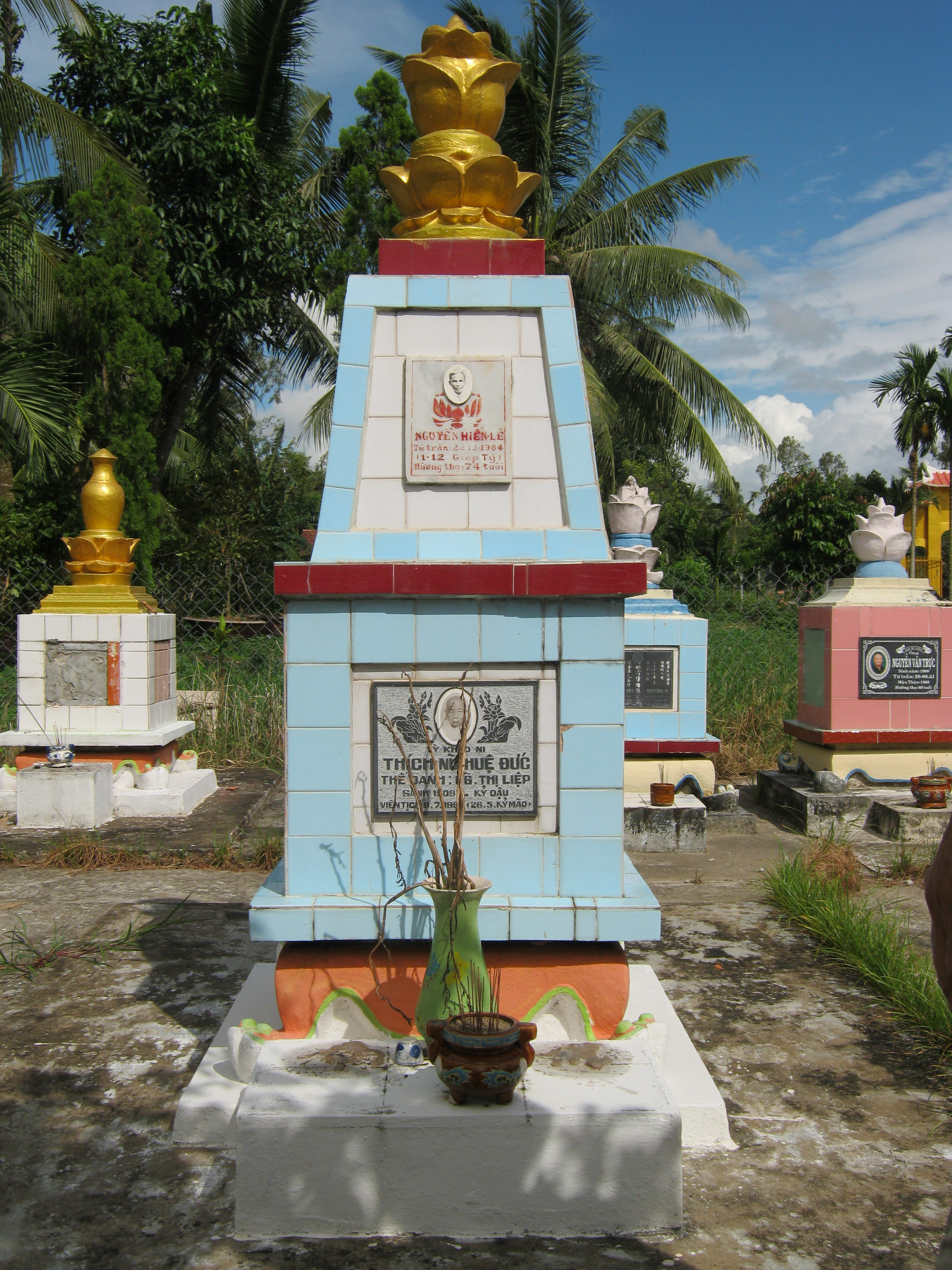 Nơi lưu giữ di cốt của học giả Nguyễn Hiến Lê (phần trên ngôi tháp) trong khuôn viên khuôn viên chùa Phước Ân ở Rạch Cai Bường (thuộc xã Vĩnh Thạnh, huyện Lấp Vò, tỉnh Đồng Tháp, Việt Nam).